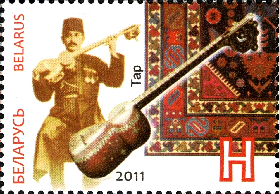 Совместный выпуск Беларуси и Азербайджана